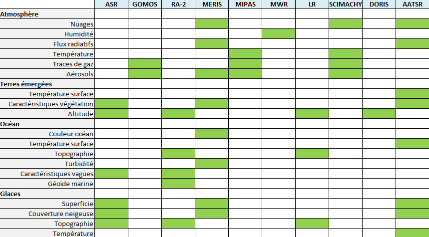 Instruments Envisat